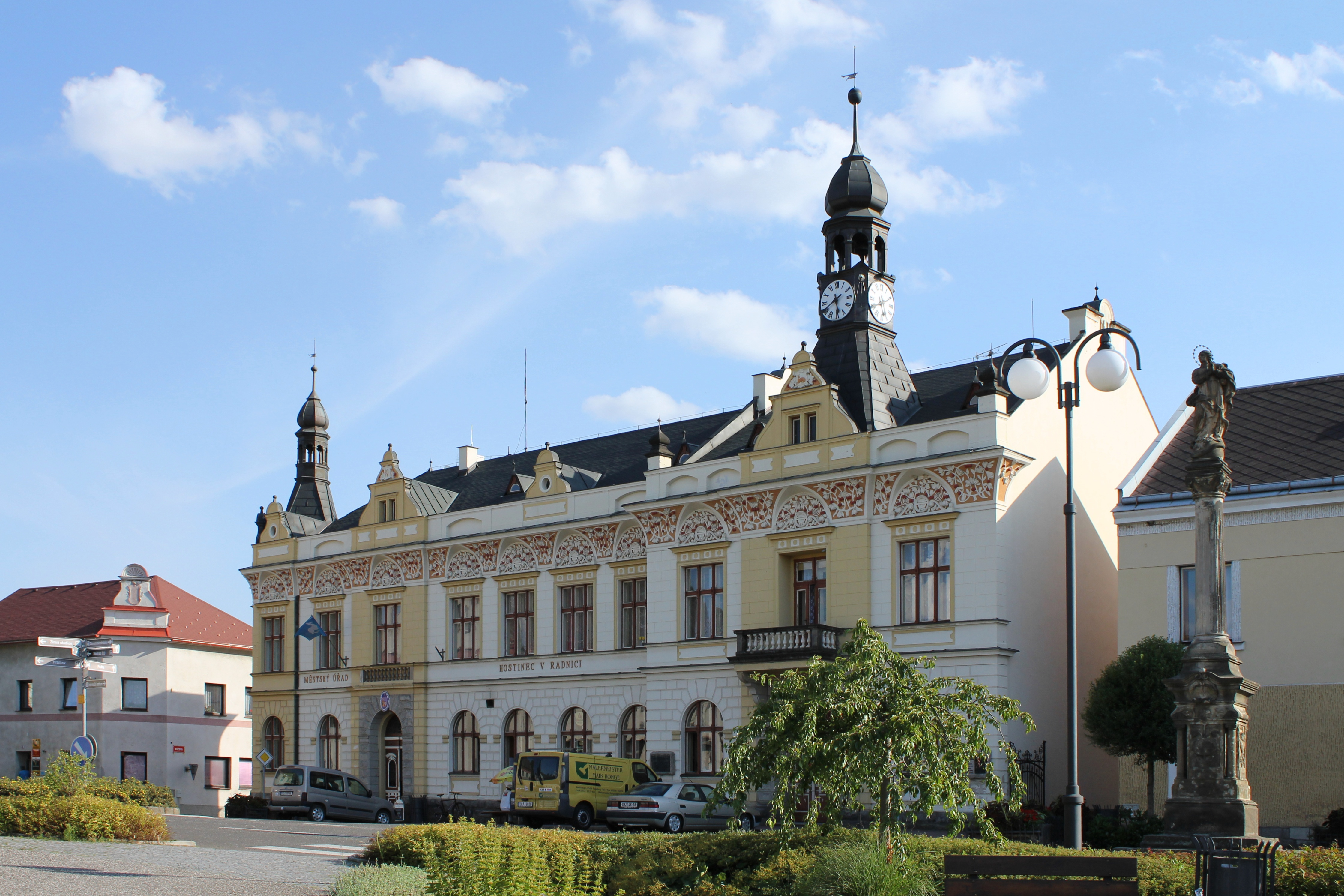 Radnice, Rovensko pod Troskami